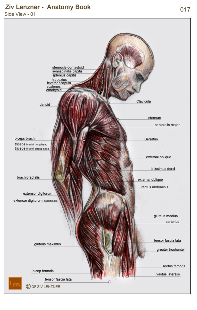 זיו לנצנר רישום אנטומי